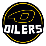 Logo der Stavanger Oilers